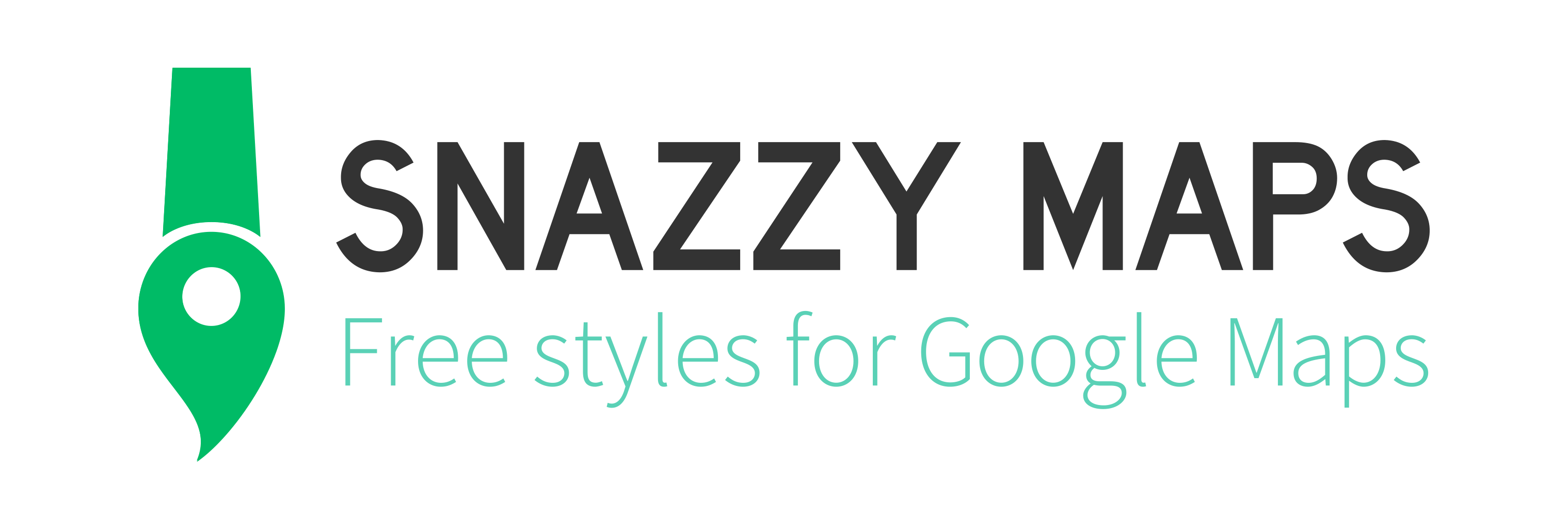 Snazzy Maps Logo